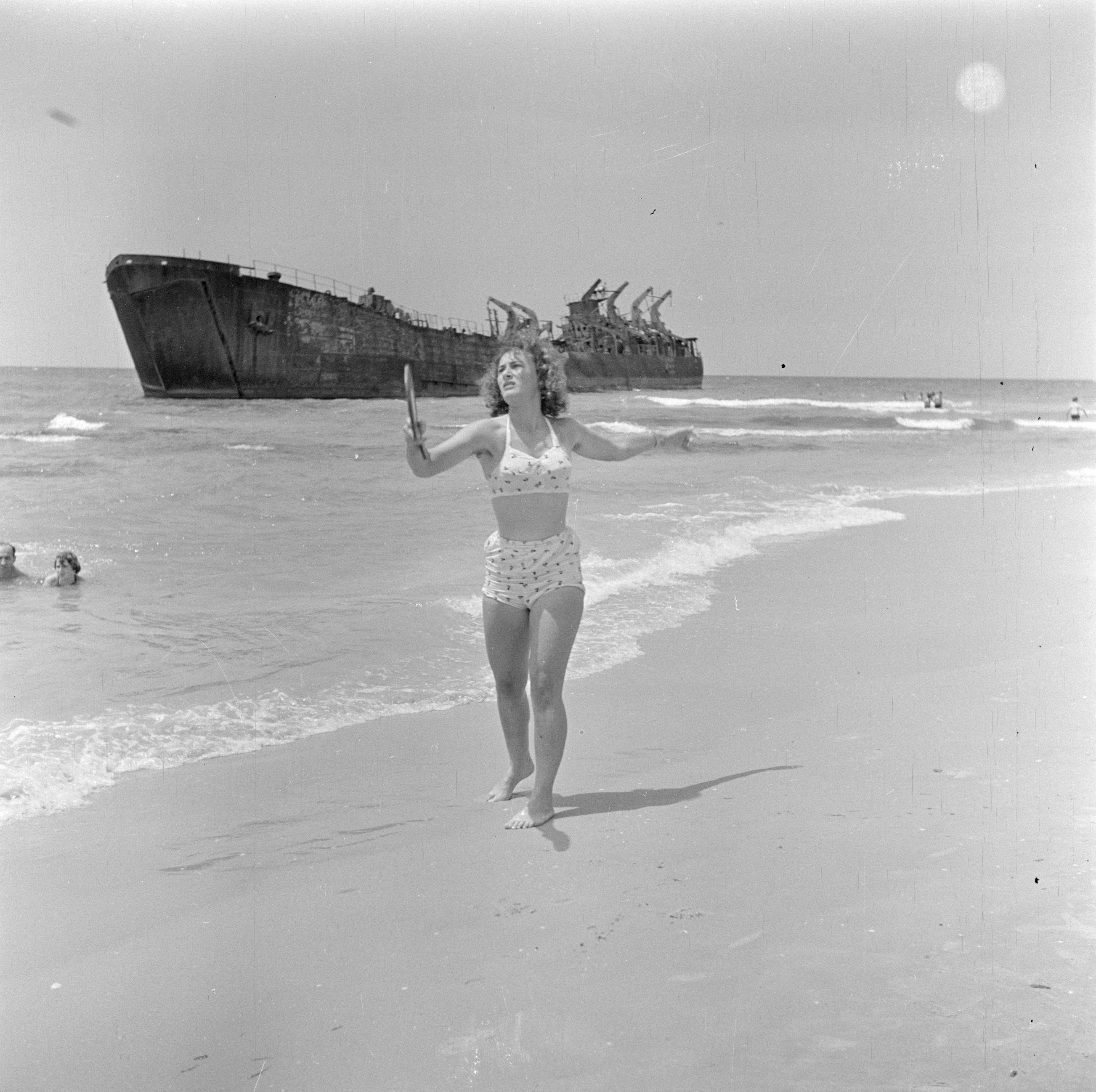 Collectie / Archief : Fotocollectie Van de Poll Reportage / Serie : Israel 1948-1949: Tel Aviv Beschrijving : Tel Aviv. Strand bij de strandboulevard. Een dame in bikini tijdens het spelen van een balspel. Op de achtergrond het scheepswrak van de ms Altalena. "Vitality, elegance and energy in front of a burnt out wreck of a ship that has played a dramatic role in the Israelian struggle for independence" Datum : 1948-1949 Locatie : Israël, Middellandse Zee, Tel Aviv Trefwoorden : balsporten, bikini´s, golven, scheepsongevallen, stranden, wrakken, zwemkleding Fotograaf : Poll, Willem van de, [onbekend] Auteursrechthebbende : Nationaal Archief Materiaalsoort : Negatief (zwart/wit) Nummer archiefinventaris : bekijk toegang 2.24.14.02 Bestanddeelnummer : 255-1373